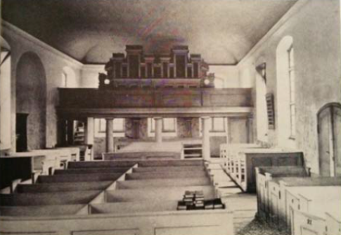 Mennonitenkirche Königsberg um 1899, Blick zur Orgel